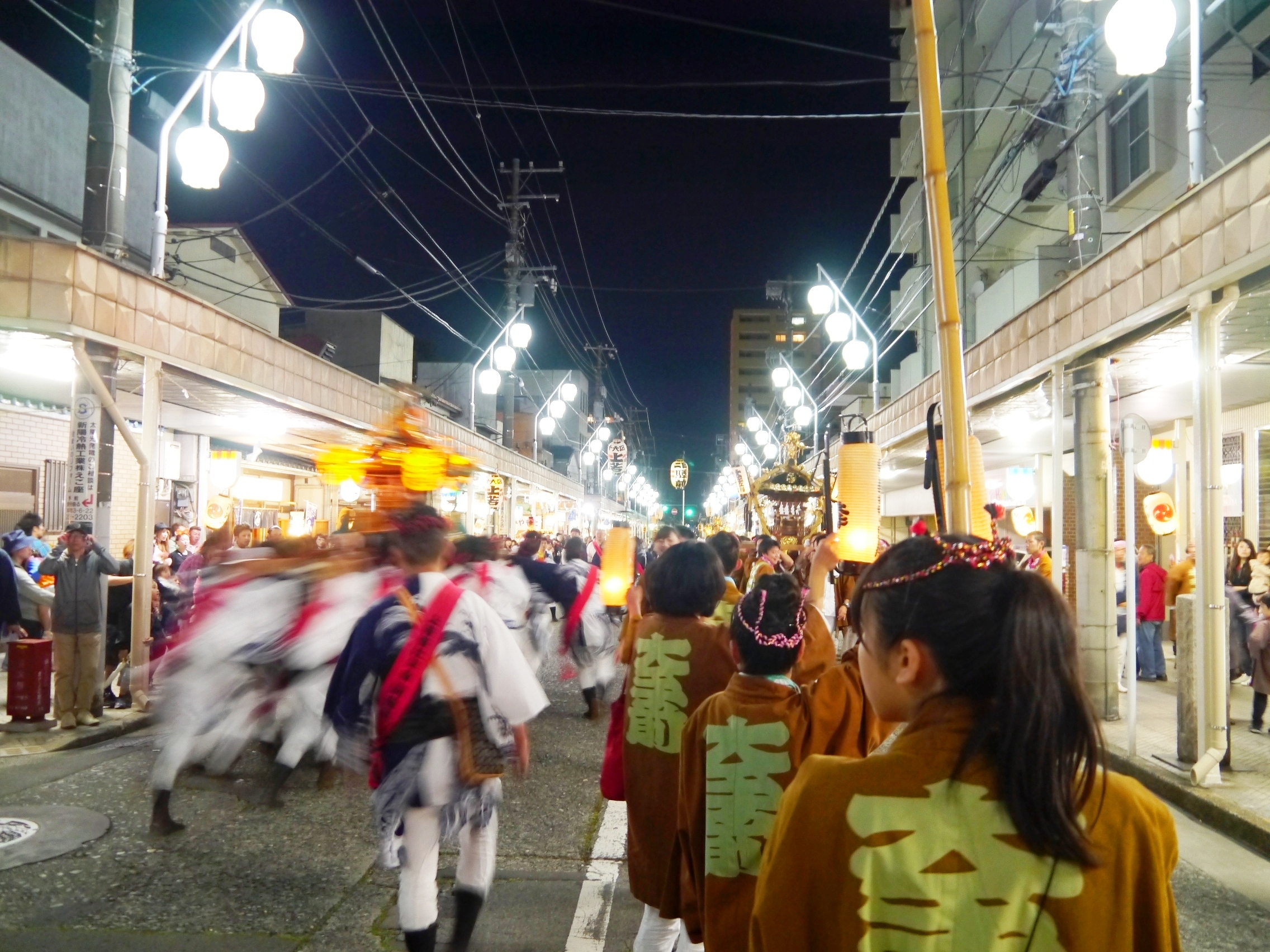 宮入り前の青物町で練習も兼ねて突っ駆ける神輿。